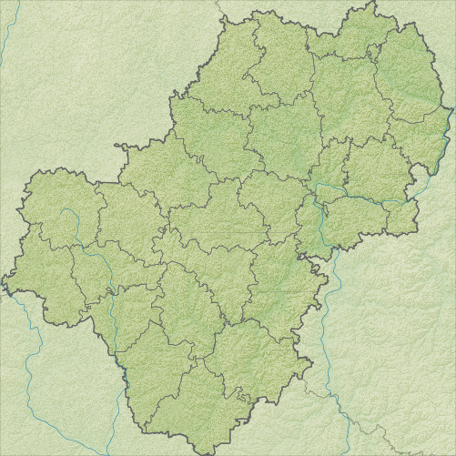 Физическая карта Калужской области. Область: E33.4341431 / E37.2972107 / N53.277531 / N55.341641 Инструменты: GMT, Inkscape This map may be incomplete, and may contain errors. Don't rely solely on it for navigation.